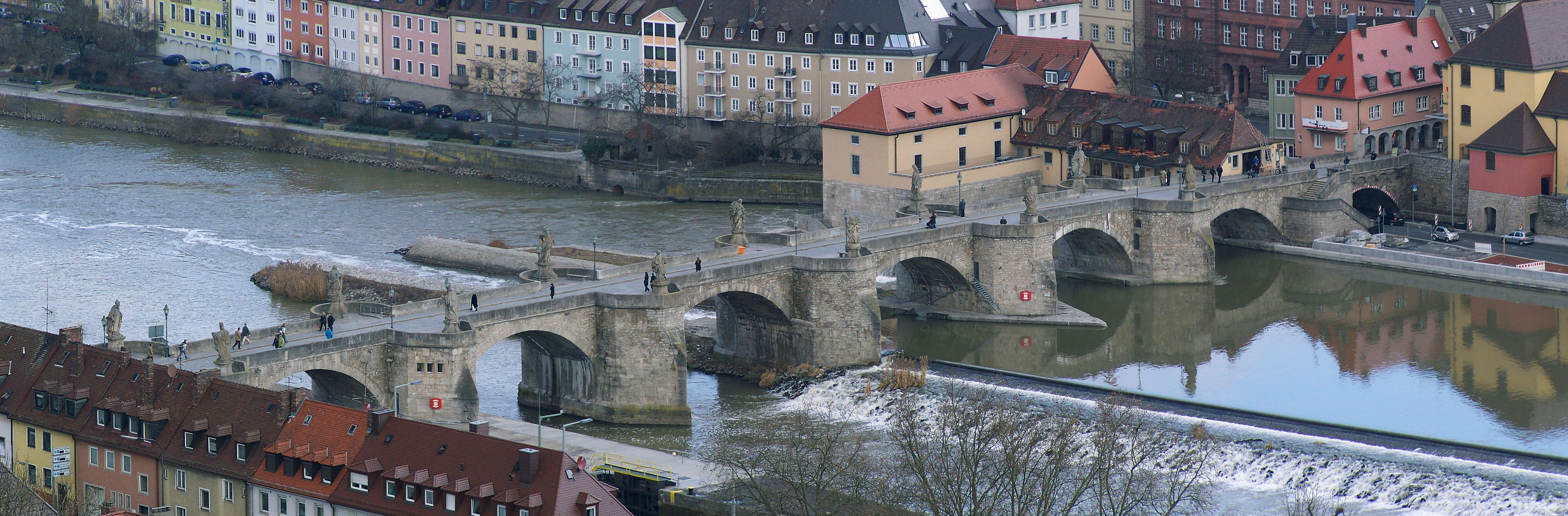 Alte Mainbrücke in Würzburg von der Festung Marienberg aus gesehen